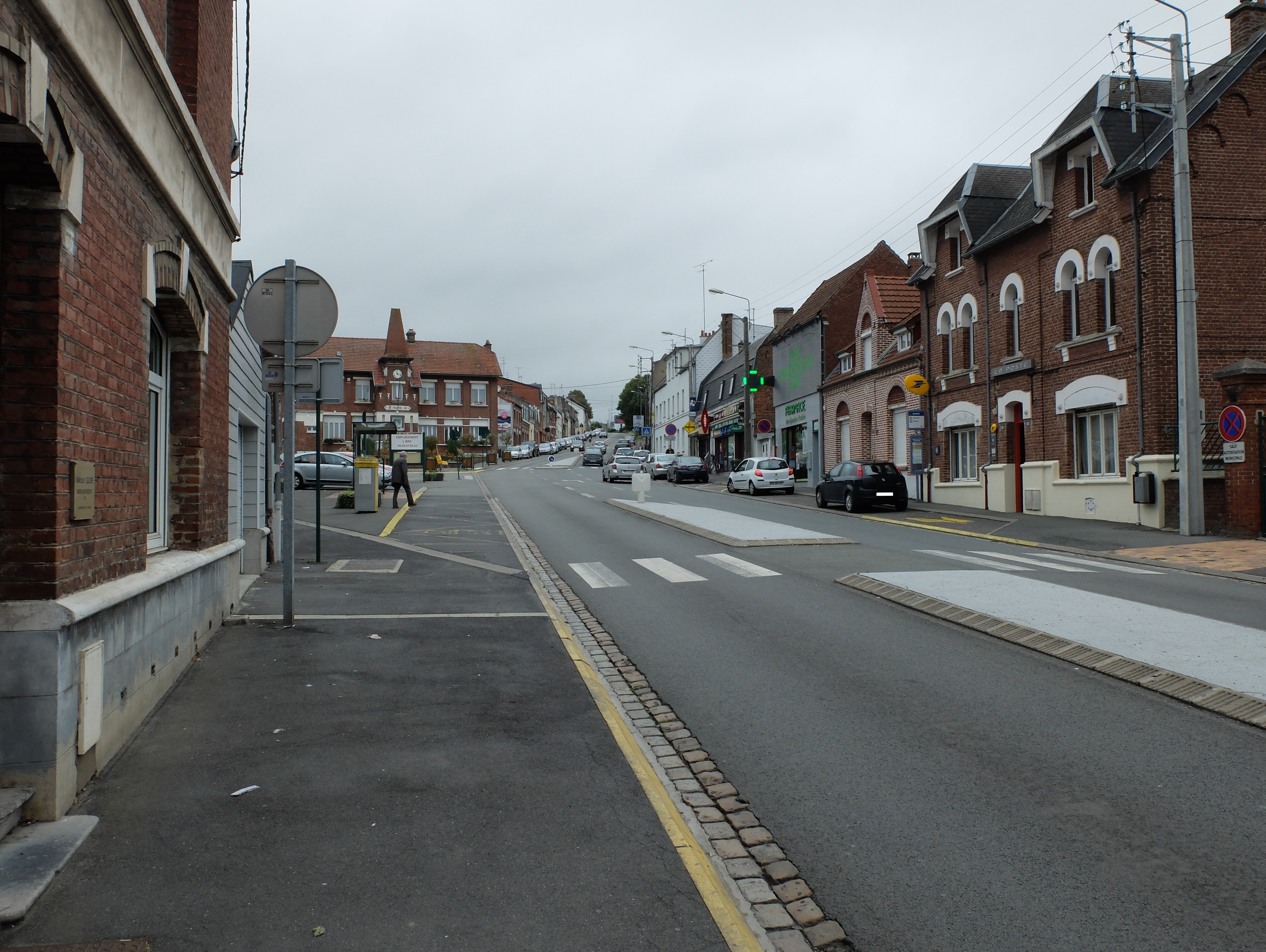 Route de Lens et place de la République à Sainte-Catherine (Pas-de-Calais).